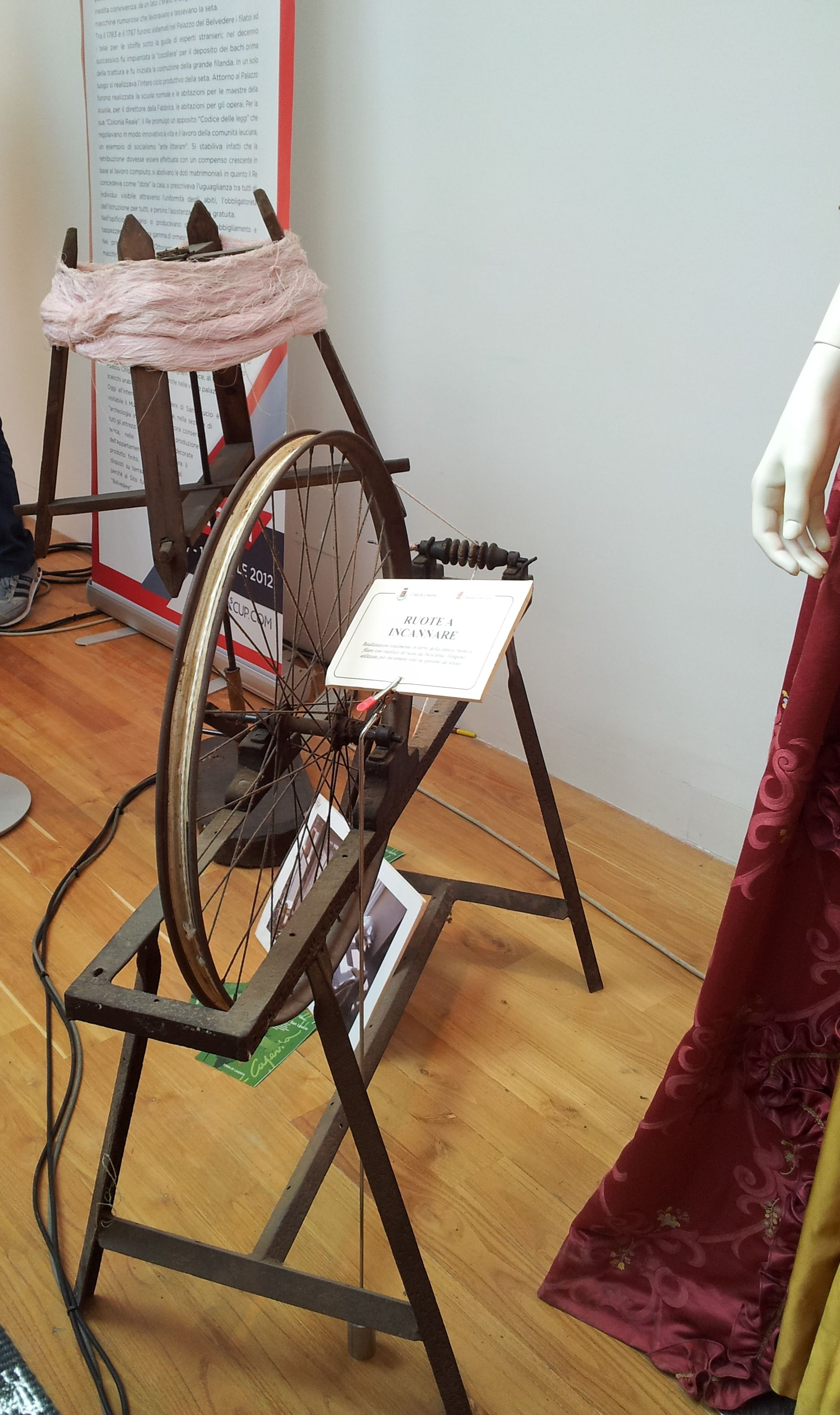 Ruote a incannare - Strumento antico di tessitura utilizzato nei reali stabilimenti di San Luecio (Caserta)